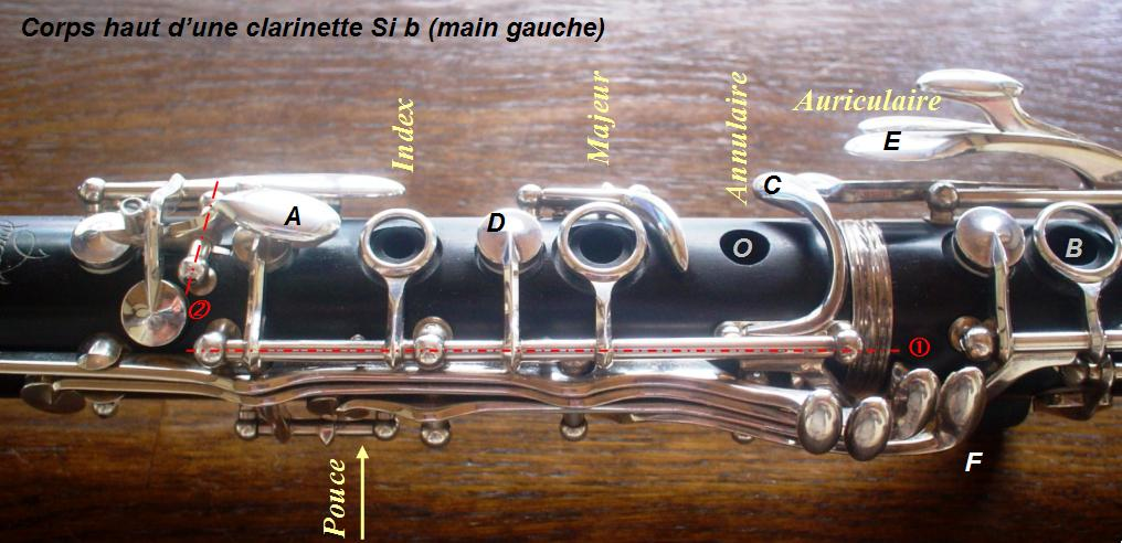 Photo numérique commentée sous word Détail des différentes fonctions assurées par les clefs d'un instrument à vent.